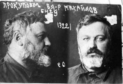 Уладзімір Пракулевіч, фота з крымінальнай справы.